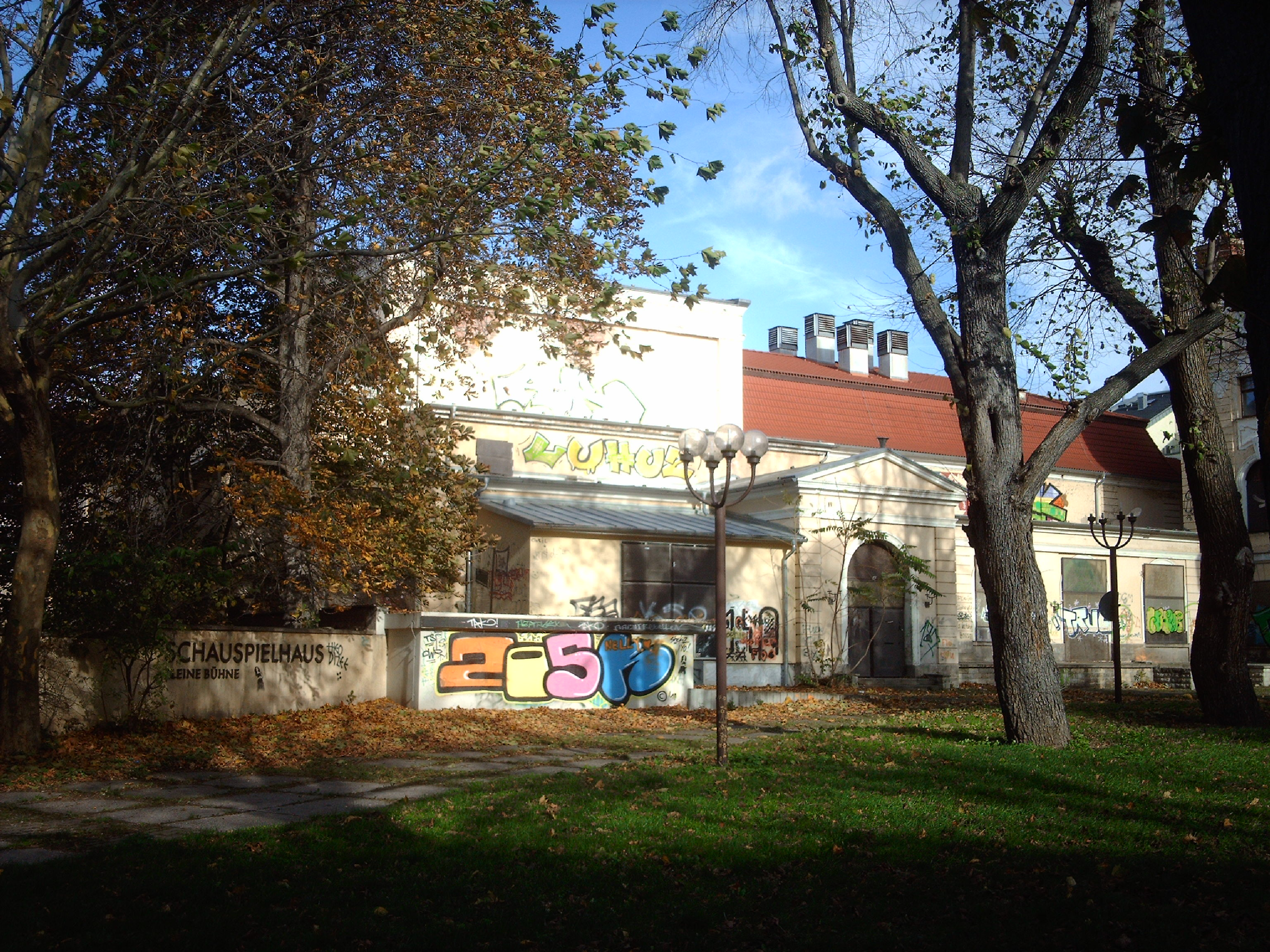 Das Schauspielhaus in Erfurt, Klostergang 4, Zustand 2013.